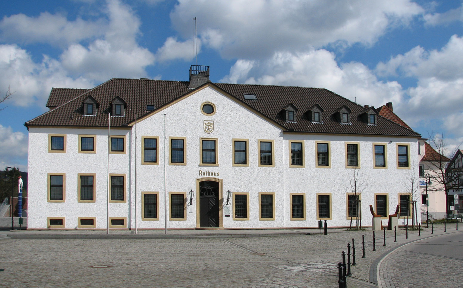 Rathaus in Dissen am Teutoburger Wald